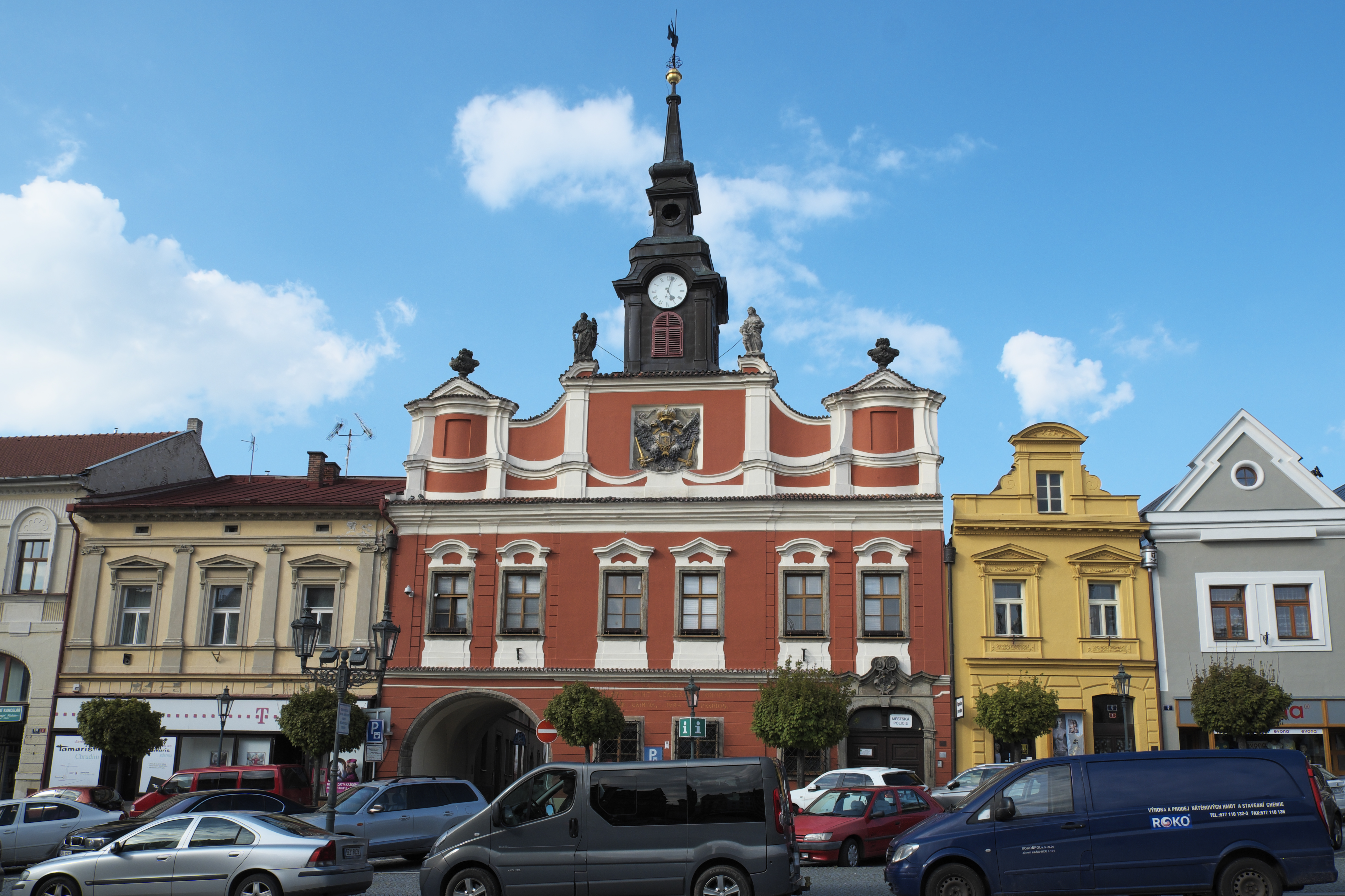 Altes Rathaus in Chrudim in der Pardubitzer Region in Tschechien